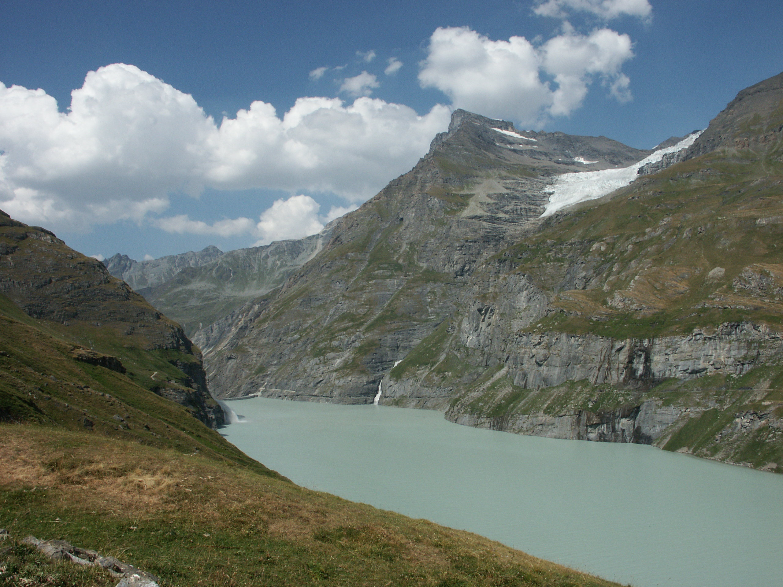 Lac de Mauvoisin, in Bagnes, Valais, Switzerland.